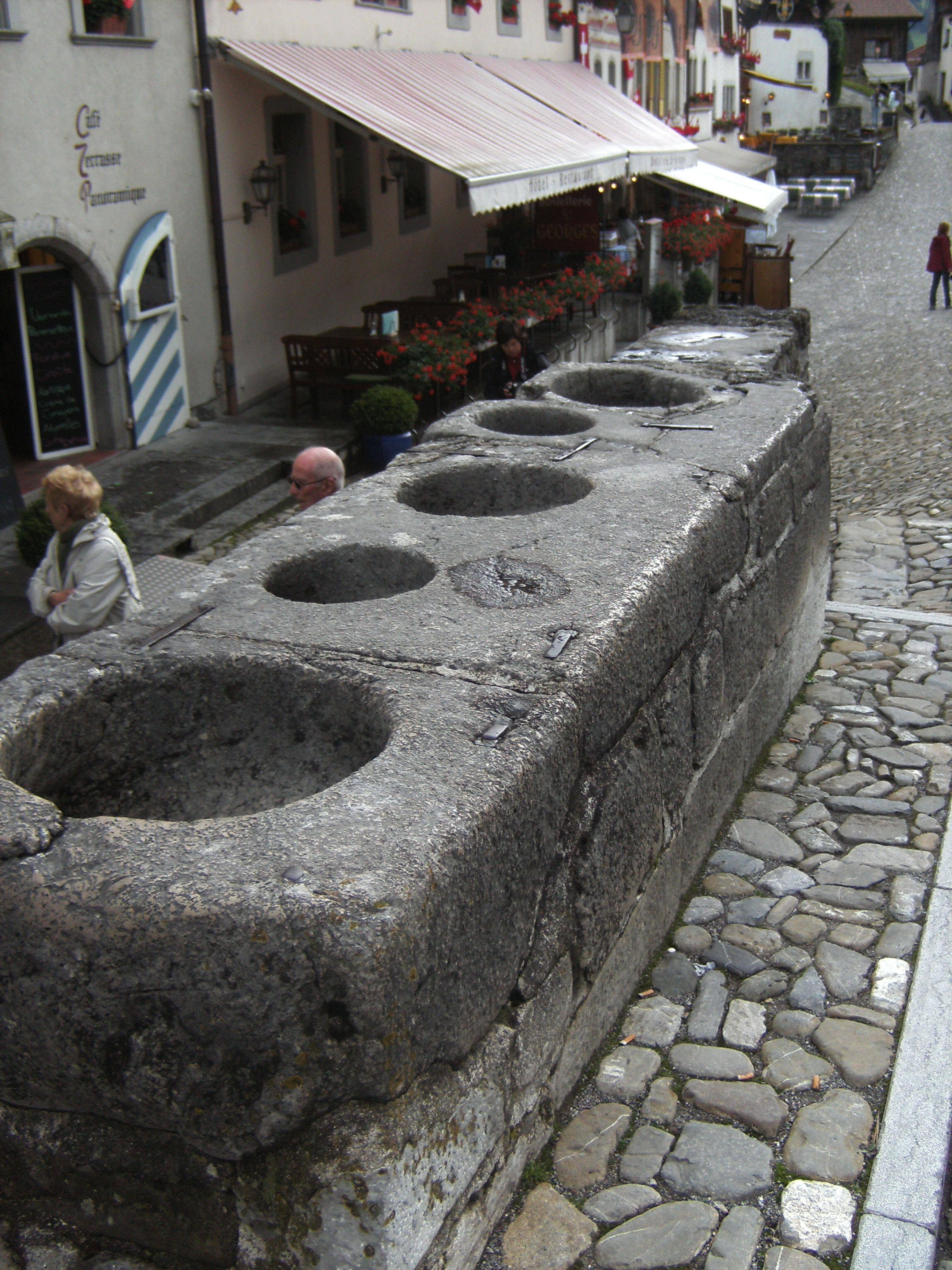 Gruyères (Suisse, canton de Fribourg) : mesures à grain en pierre sur la place du marché - XII-XIIIe siècle. Vue supérieure.